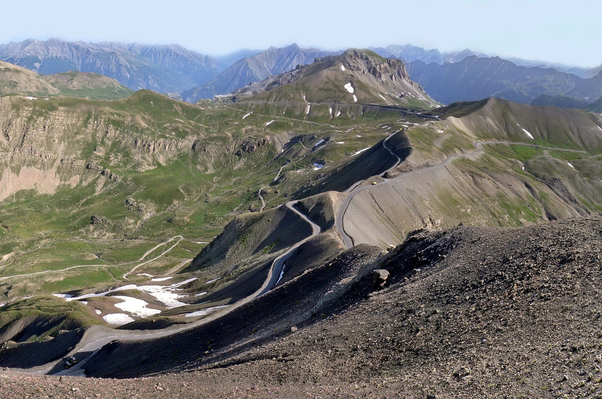 Col de la Bonette, vu depuis la cime de la Bonnette